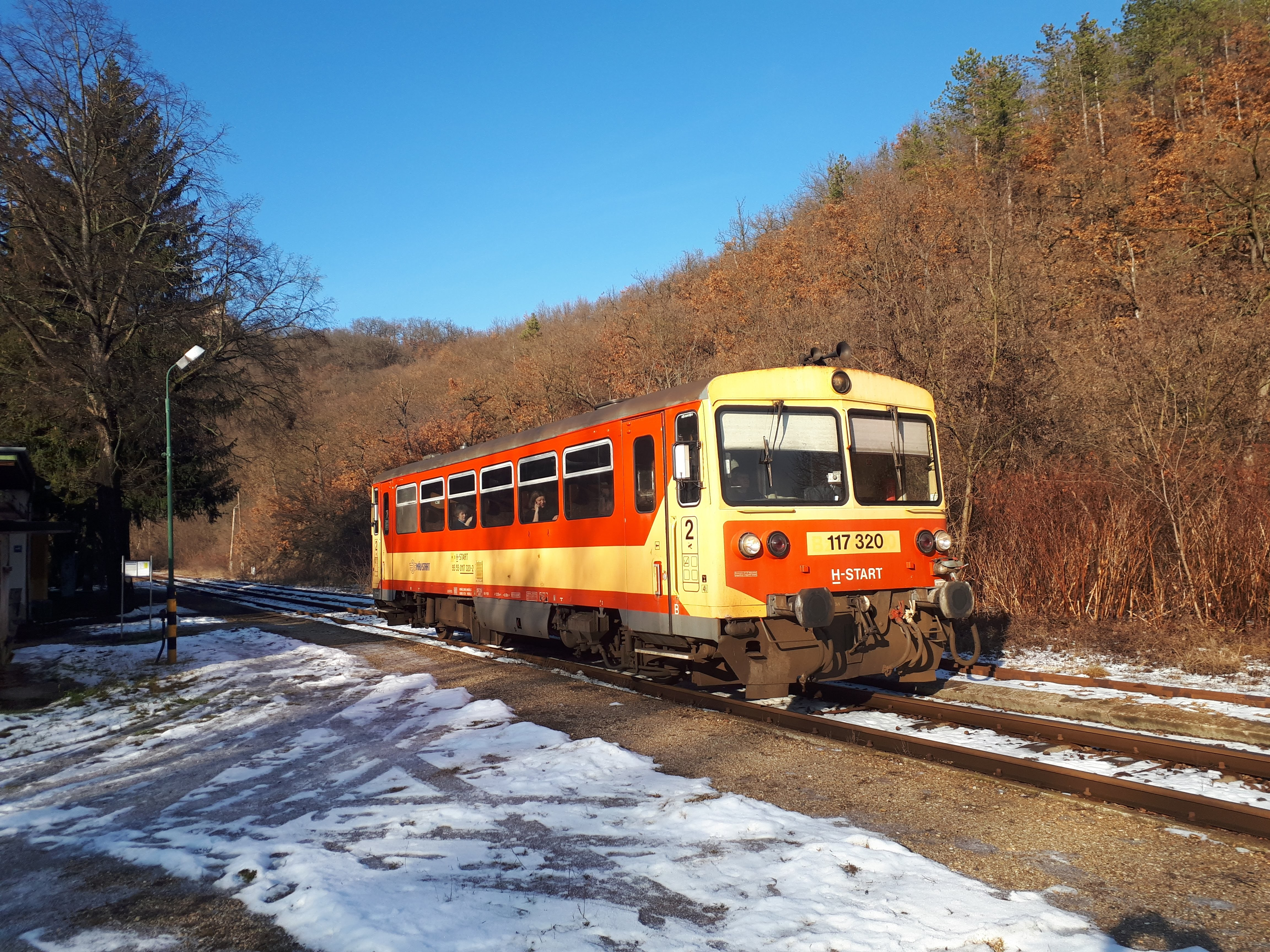 A 117 320-as pályaszámú Bzmot motorvonat Szarvaskő vasútállomásán